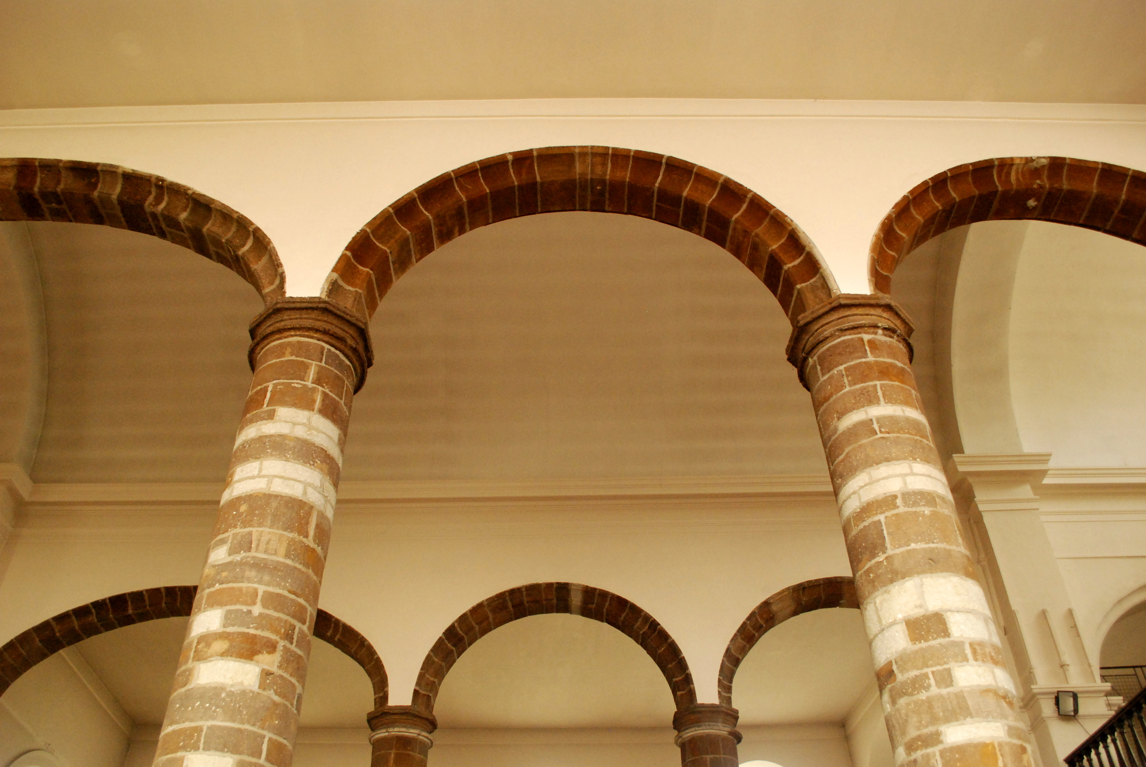 Belgique - Wallonie - Wavre - Église Saint-Martin de Limal